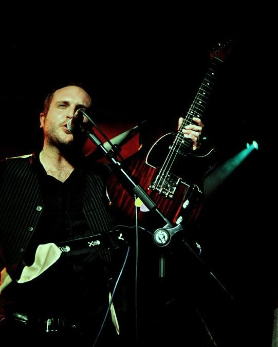 Concierto presentación de Hoja de Ruta en Madrid